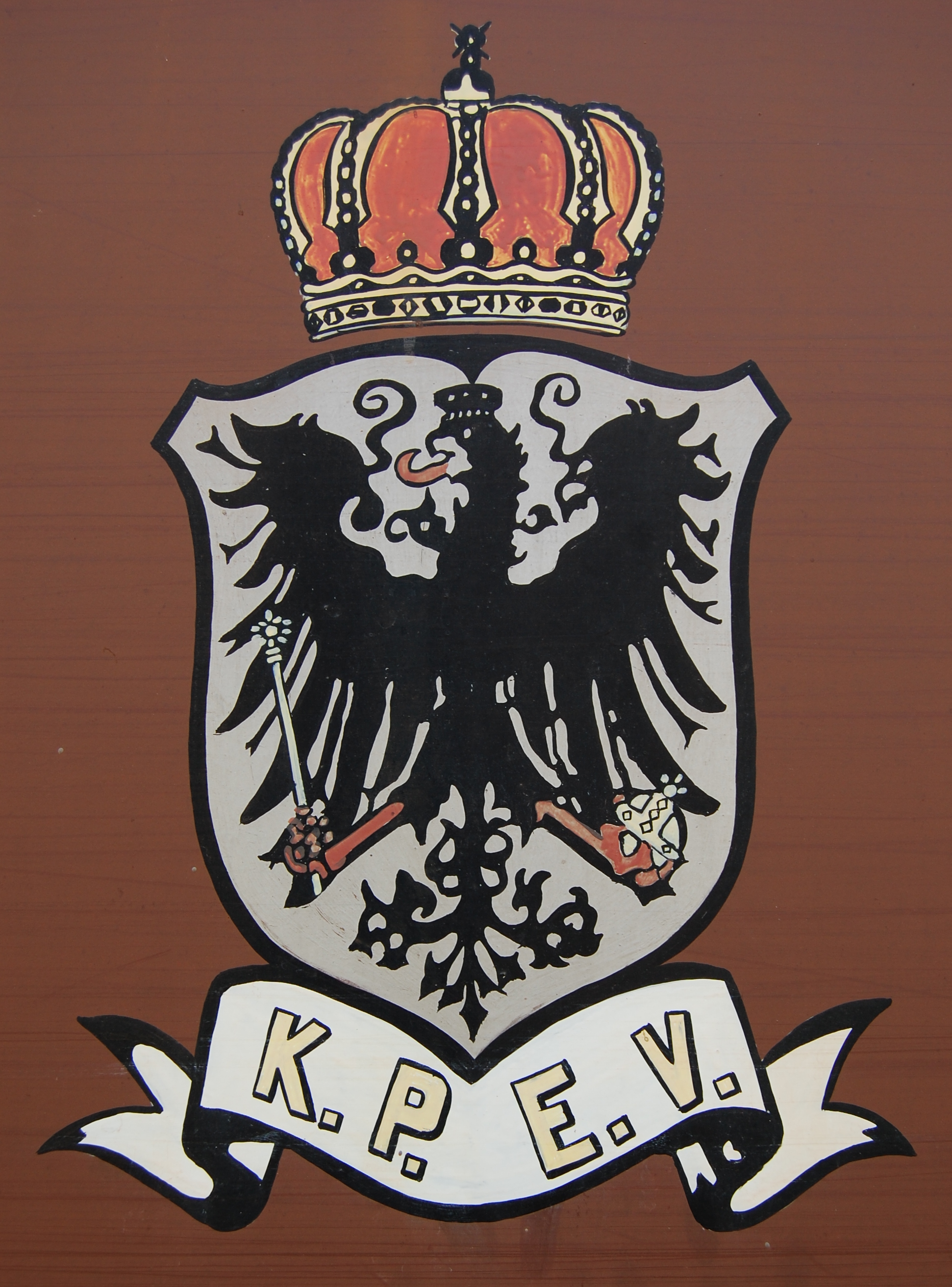 Logo der KPEV an einem preußischen Gepäckwagen